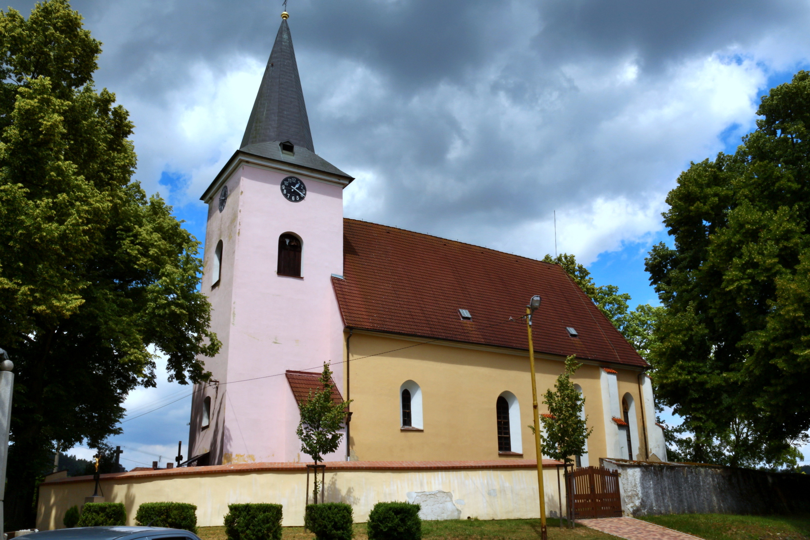 Keblov, náves